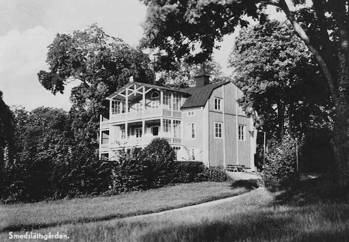 Smedslättens gård 1940, Smedslätten, Bromma, Stockholm.